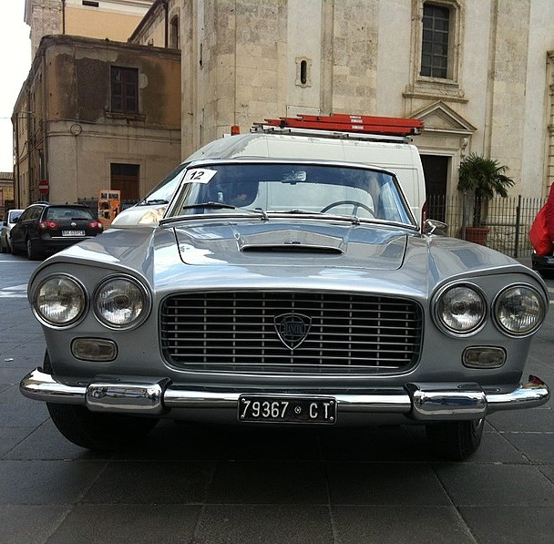 Auto storica: Lancia Flaminia GT